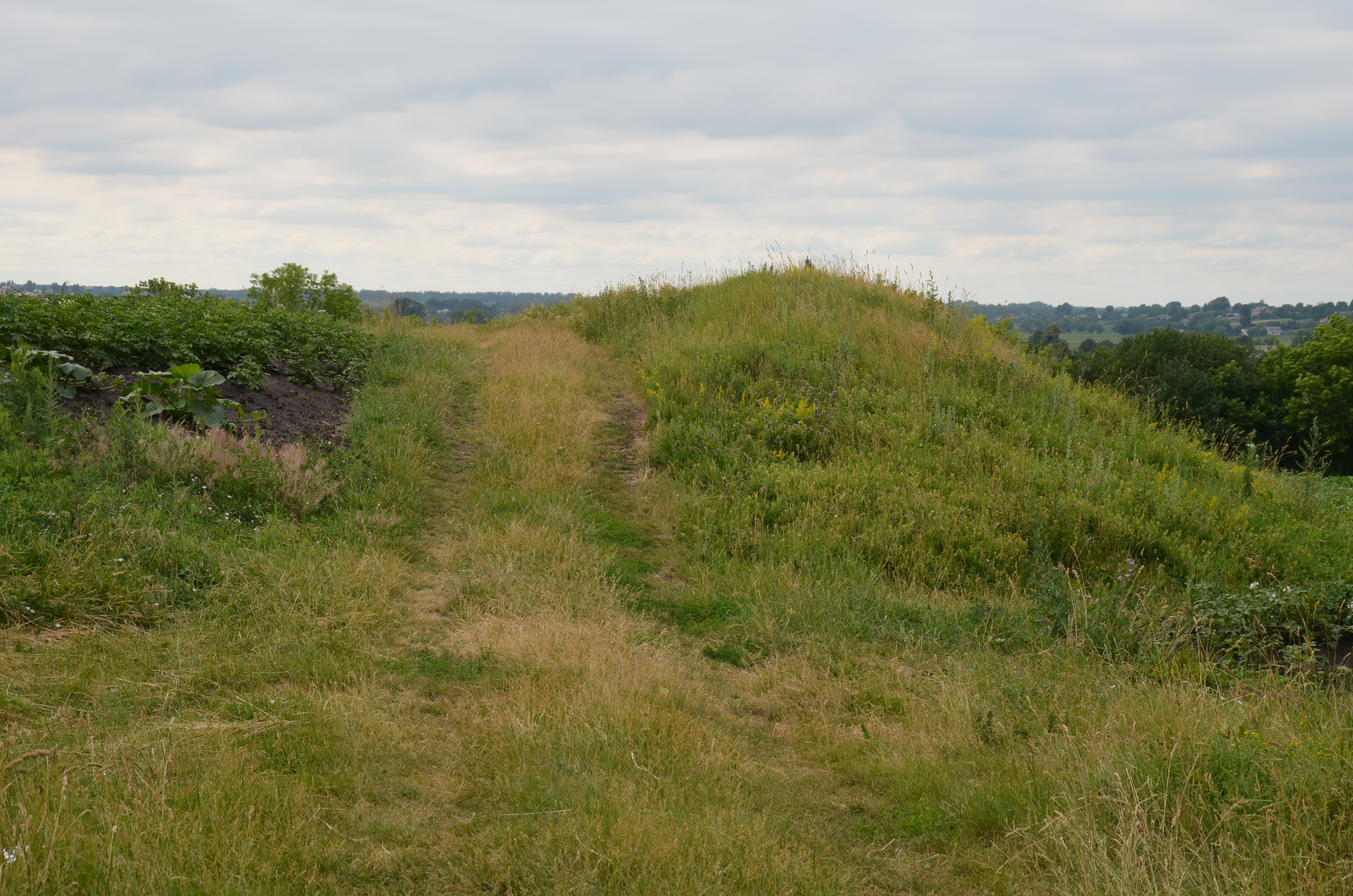 Городище літописного міста Котельнича і поселення , Стара Котельня, півнично-західна частина села, правий берег р. Гуйва, урочище Вали